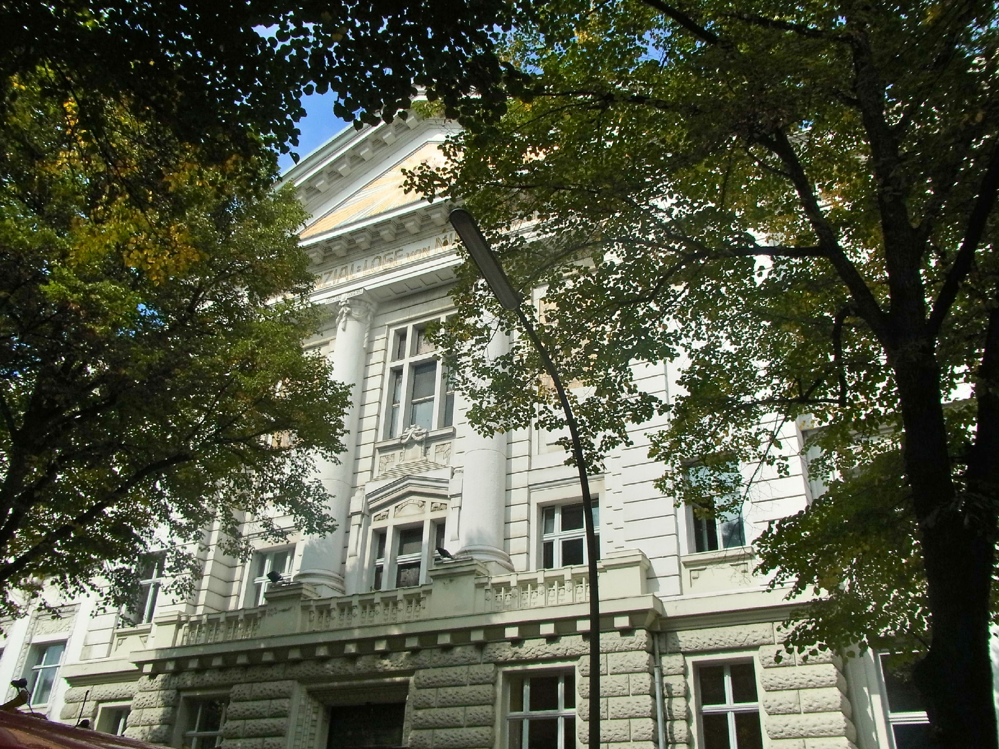 Das Logenhaus der Freimaurer in der Moorweidenstraße 36 im Hamburger Stadtteil Rotherbaum wurde zwischen 1907 und 1909 von den Architekten Leopold Strelow, Hermann Schomburgk und M. Gerhardt gebaut. Leopold Strelow war selbst Mitglied der Loge. In der Fassade finden sich Elemente der christlichen Lehrart der Loge; in Glasmosaik die Abzeichen Johannes des Täufers, des heiligen Andreas und im Giebel das rote Kapitelkreuz, angestrahlt von der Sonne. Mehr zum Logenhaus unter; is a photograph of an architectural monument.